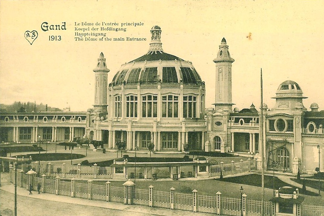 Photographie de l'exposition universelle de Gand de 1913.